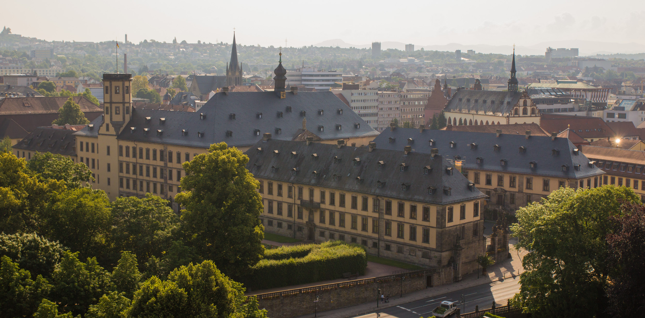 Blick vom Südturm des Fuldaer Doms